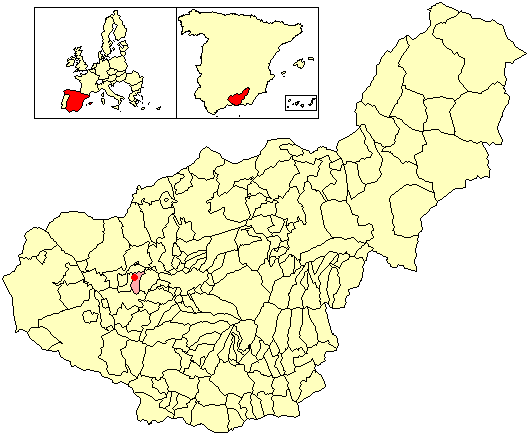 Situación de la localidad de Romilla (en el municipio de Chauchina) respecto a la provincia de Granada, en España.